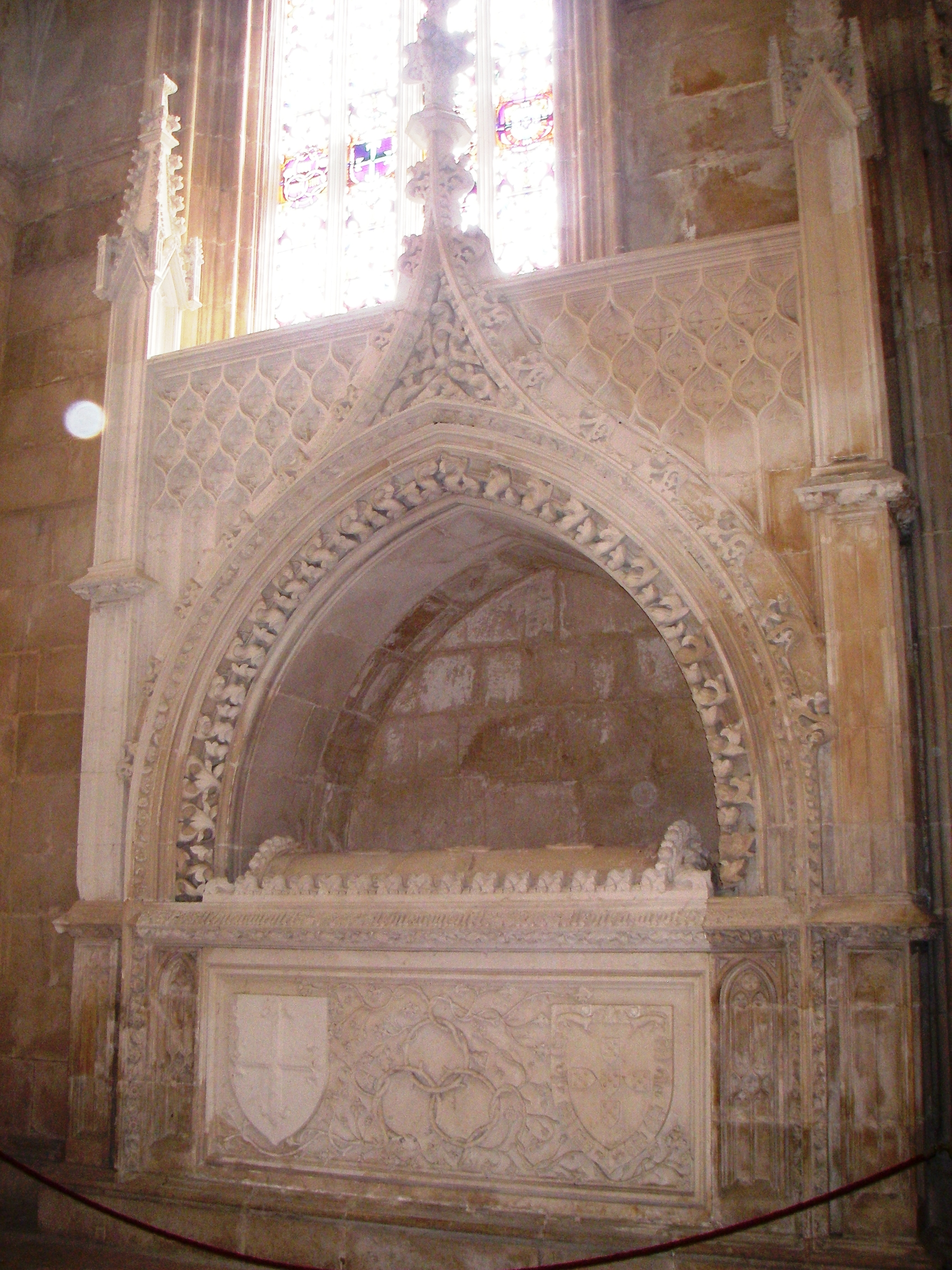 Mosteiro da Batalha Tomb of Ferdinand the Holy Prince at Batalha Monastery